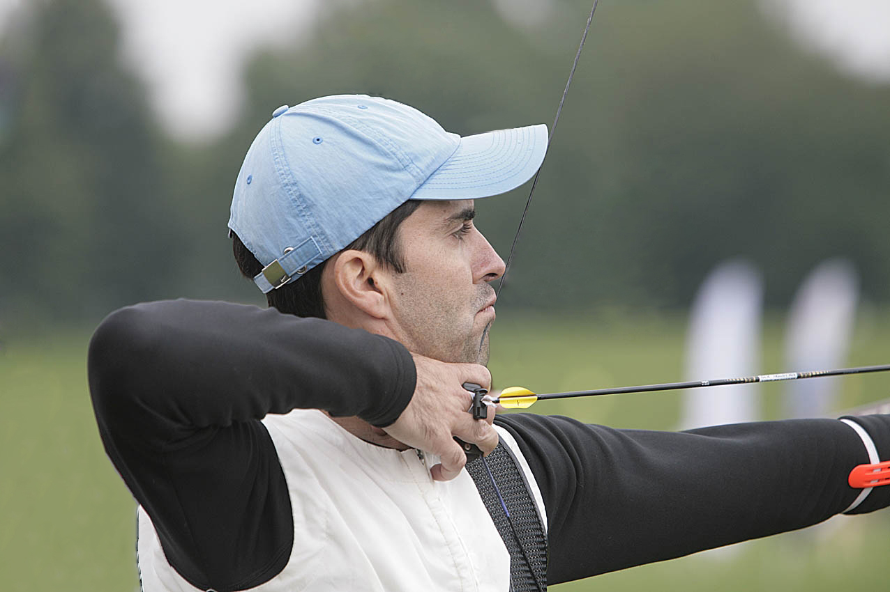 ירון טל (קולסניק) באליפות העולם בחץ וקשת, 2007